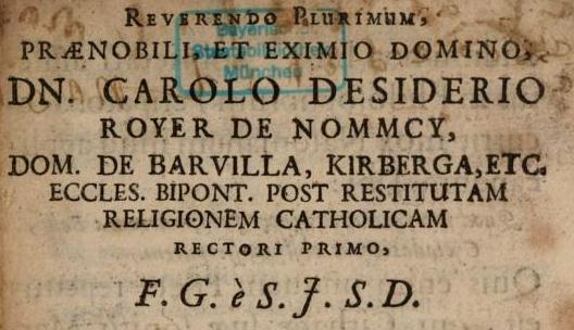 Voller Namenstitel aus dem Epigrammbuch des Priesters Desiderius de Royer, Bistum Worms (hier als Pfarrer von Zweibrücken)